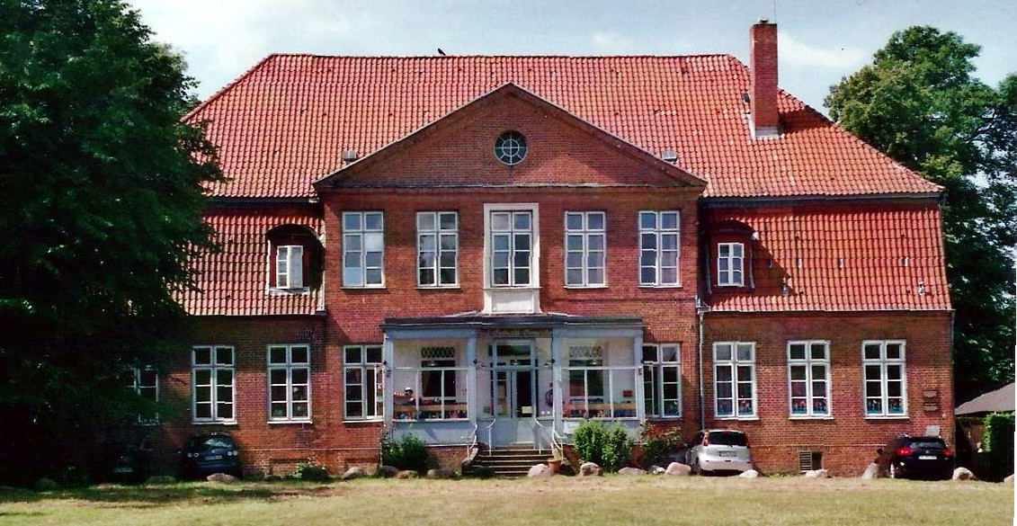 Ehemaliges Herrenhaus und heutiges Gemeindehaus von Krempelsdorf am 29. Juni 2016 gegen 11 Uhr